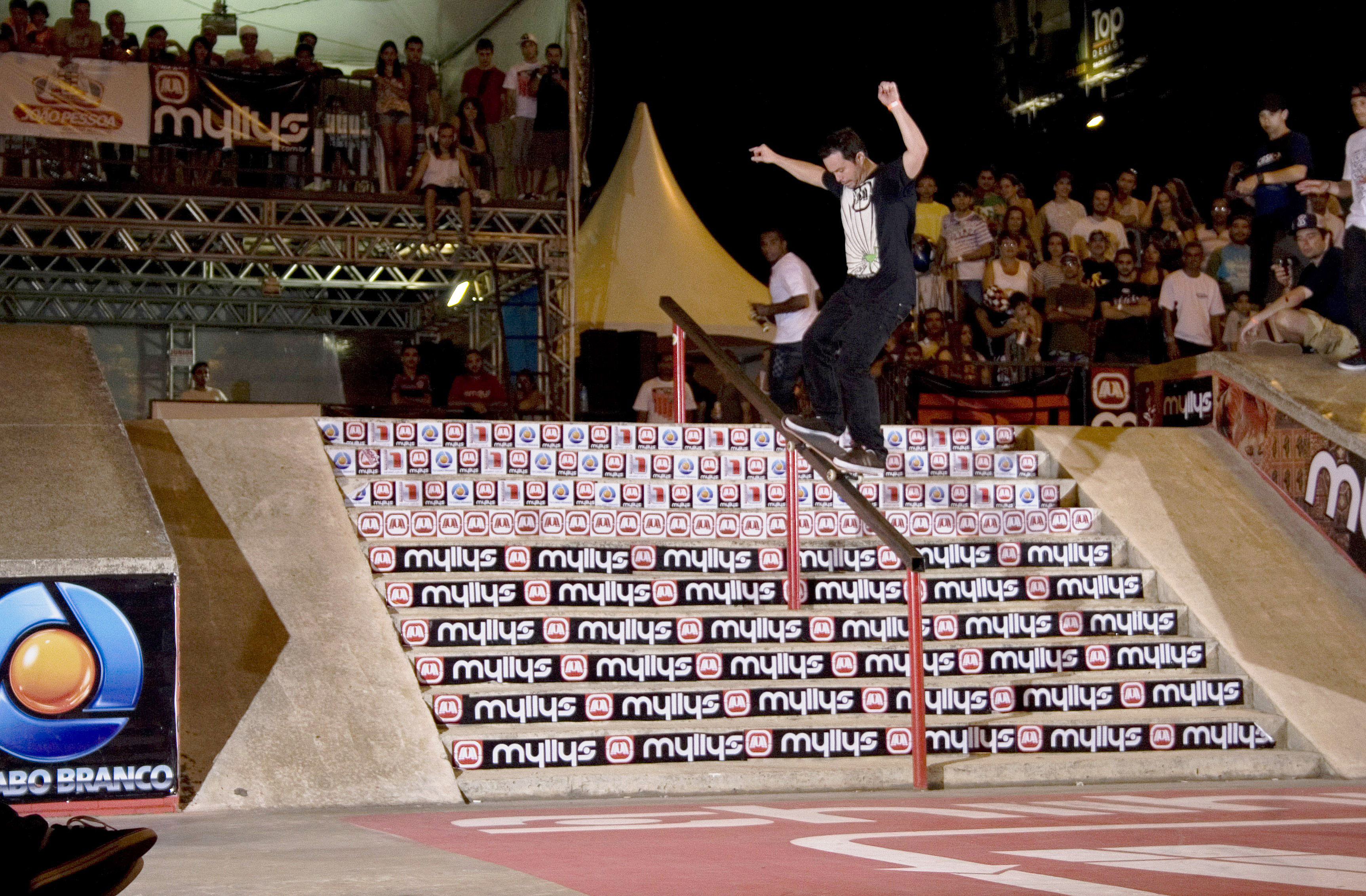 Campeonato em João Pessoa.